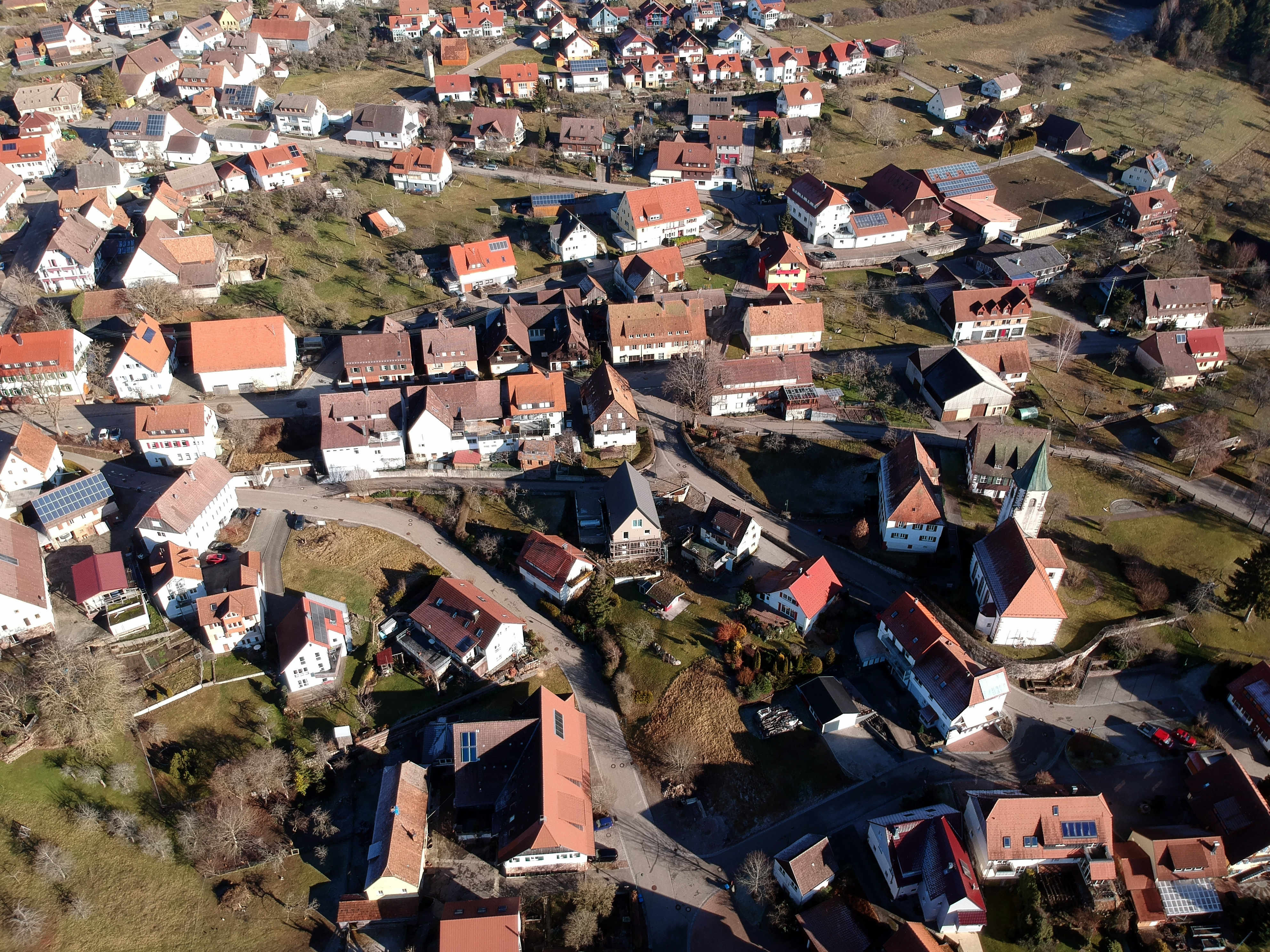 Luftbild der alten Ortsmitte von Wittendorf (Loßburg) mit evang. Martinskirche und Dorflinde